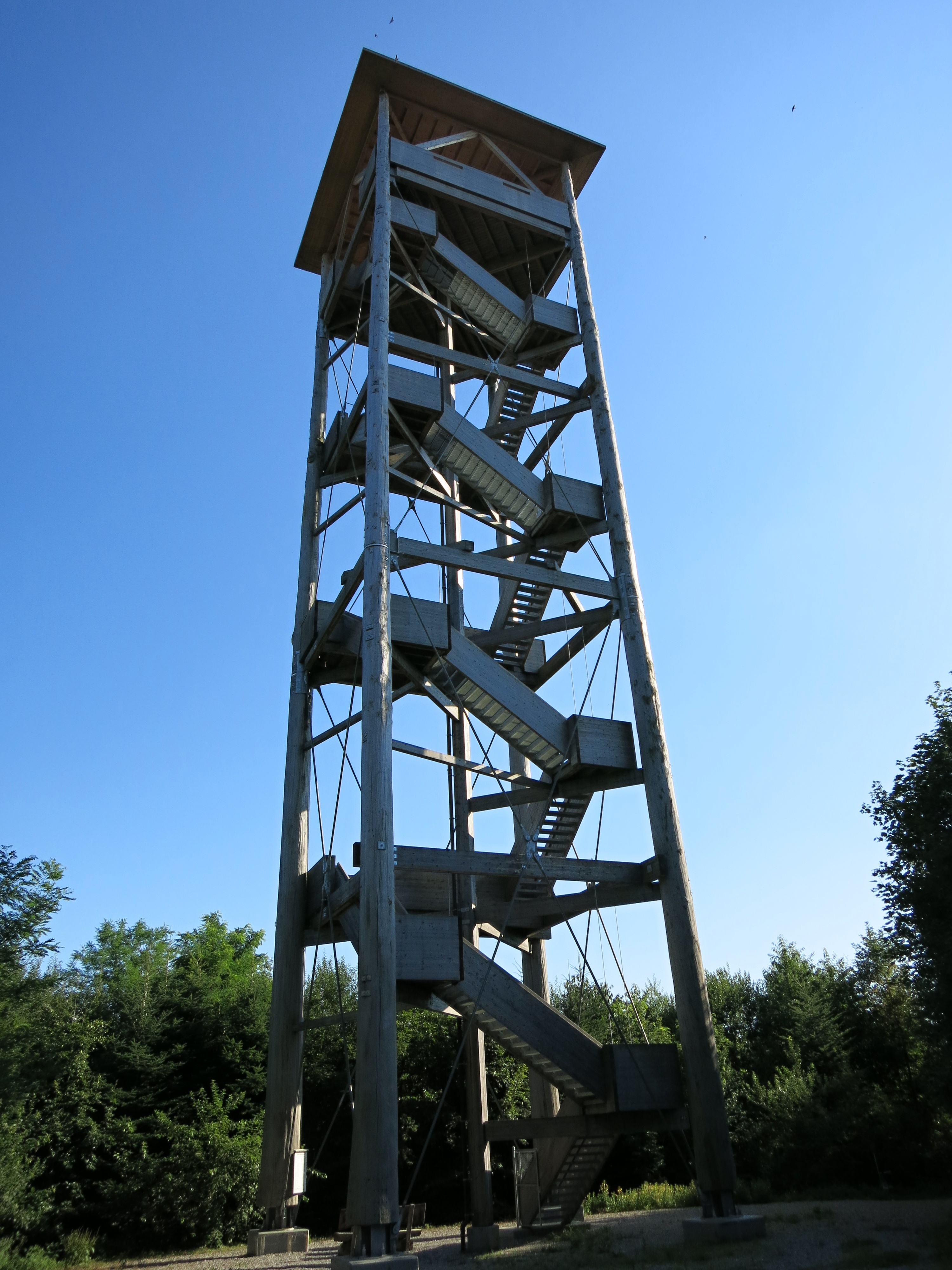 Lysser Aussichtsturm